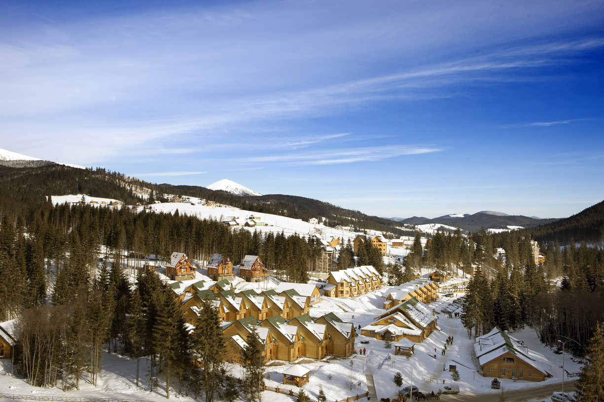 Загальний вигляд курорту